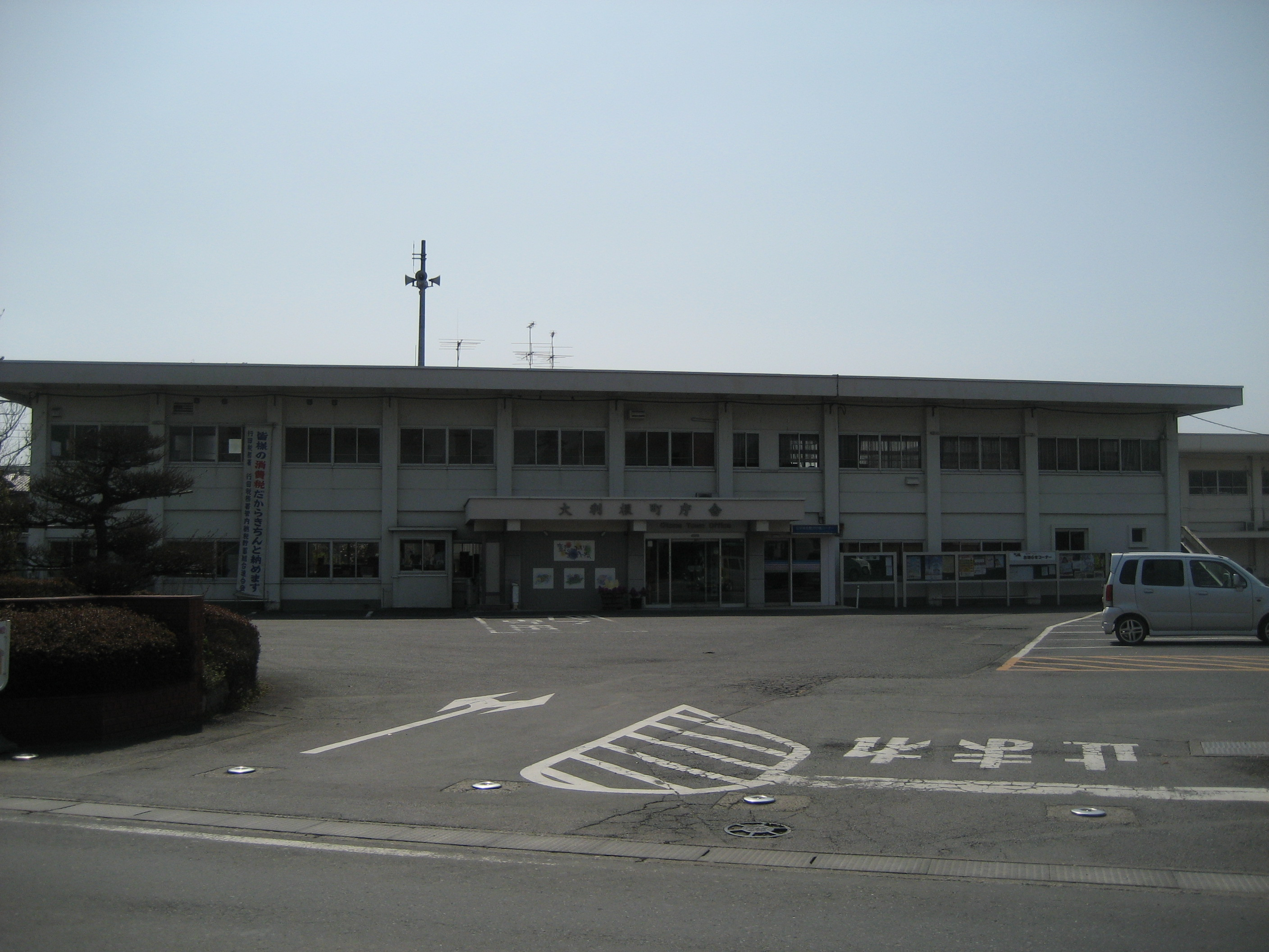 埼玉県大利根町役場。現在は加須市役所大利根総合支所となっている。